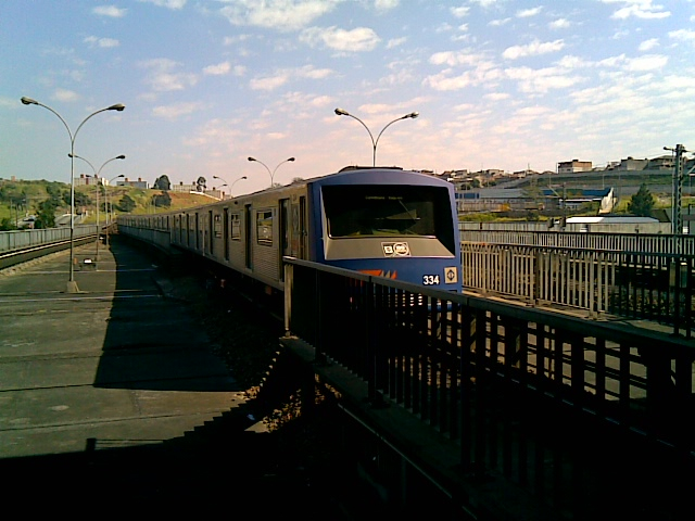 Trem do Metrô chegando à plataforma de Corinthians-Itaquera.